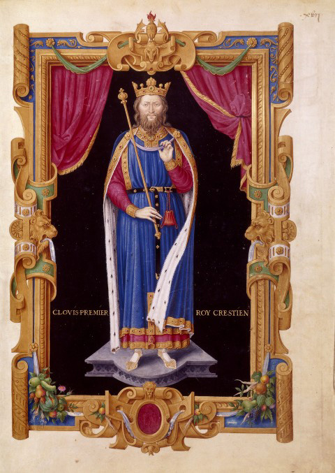 Jean Du Tillet - Clovis Ier roy crestien - Recueil des rois de France - Bibliothèque nationale de France. Peinture réalisée d'après le gisant de l'église Sainte Geneviève à Paris.